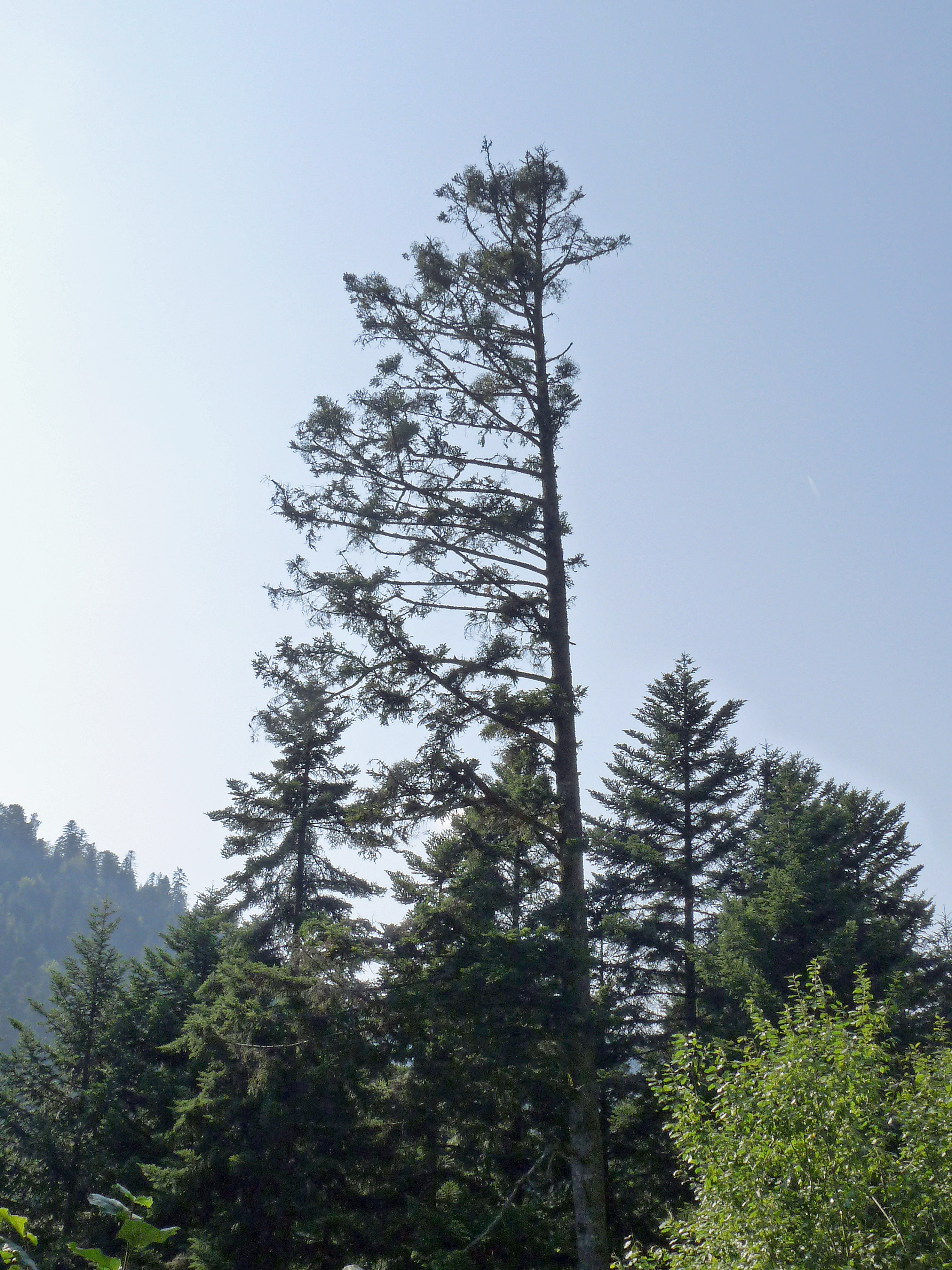 Défilé de Straiture (Vosges) : conifère asymétrique ("port en drapeau")